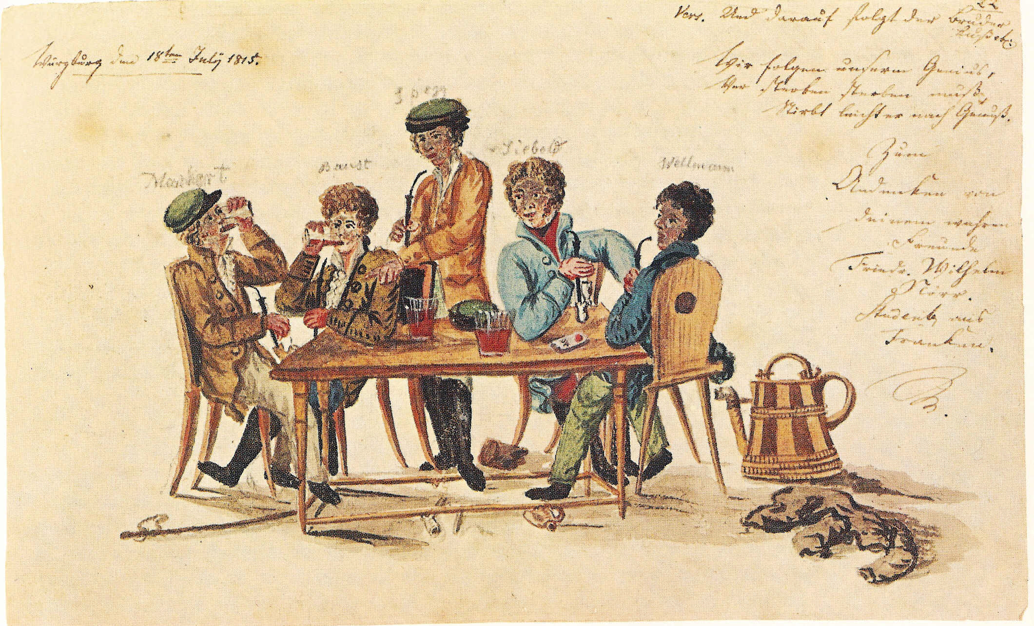 Studentisches Stammbuchblatt Würzburg vom 18. Juli 1815, aquarellierte Zeichnung, dargestellt sind Studenten des Corps Moenania Würzburg am Biertisch, zweiter von rechts Philipp Franz von Siebold, der später zum "wissenschaftlichen Entdecker Japans" wurde Rechte abgelaufen, Public Domain